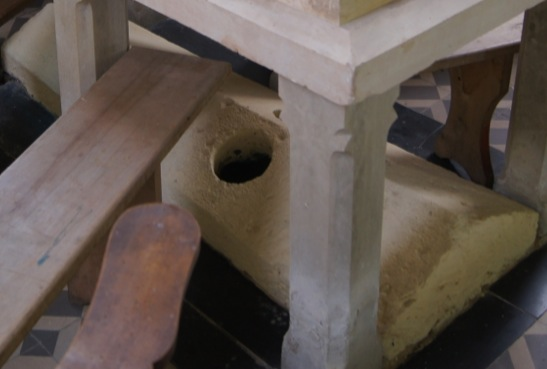 Gisant sarcophage Saint-Germain d'Ecosse Eglise Saint-Germain de Saint-Germain-sur-Bresle au dessous du gisant le sarcophage date du IXe siècle.